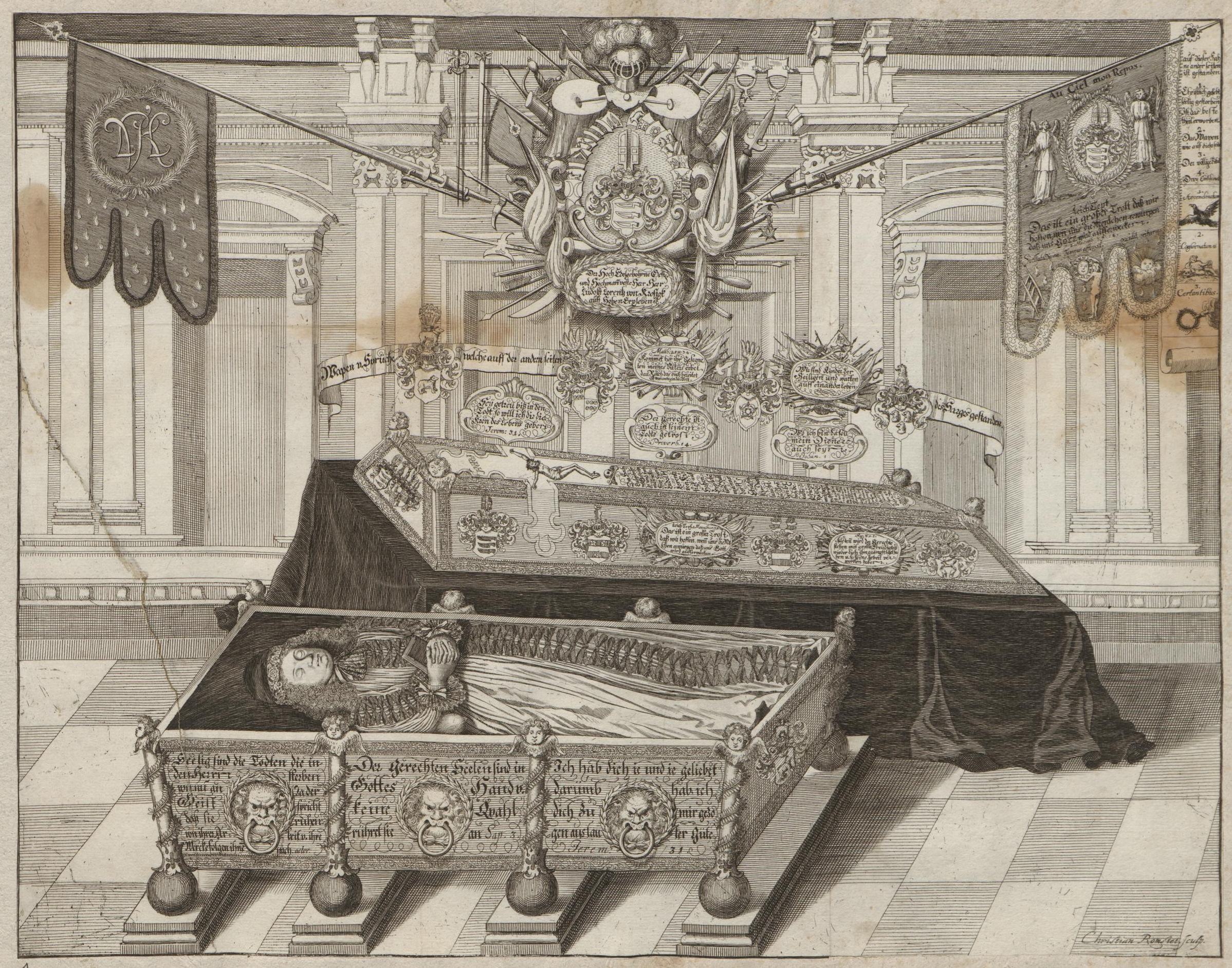 Grafik aus dem Klebeband Nr. 16 („Leichbegängnisse“) der Fürstlich Waldeckschen Hofbibliothek Arolsen Motiv: Aufbahrung Ludolf Lorenz von Krosigk († 1673)